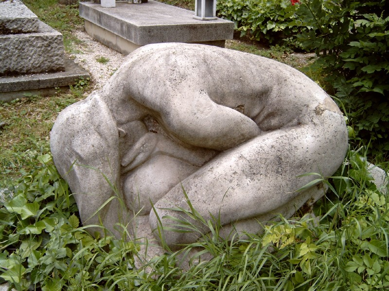 Telcs Ede sírja Budapesten. A síremlék a művész saját alkotása. Farkasréti temető: 19/1-1-234/235